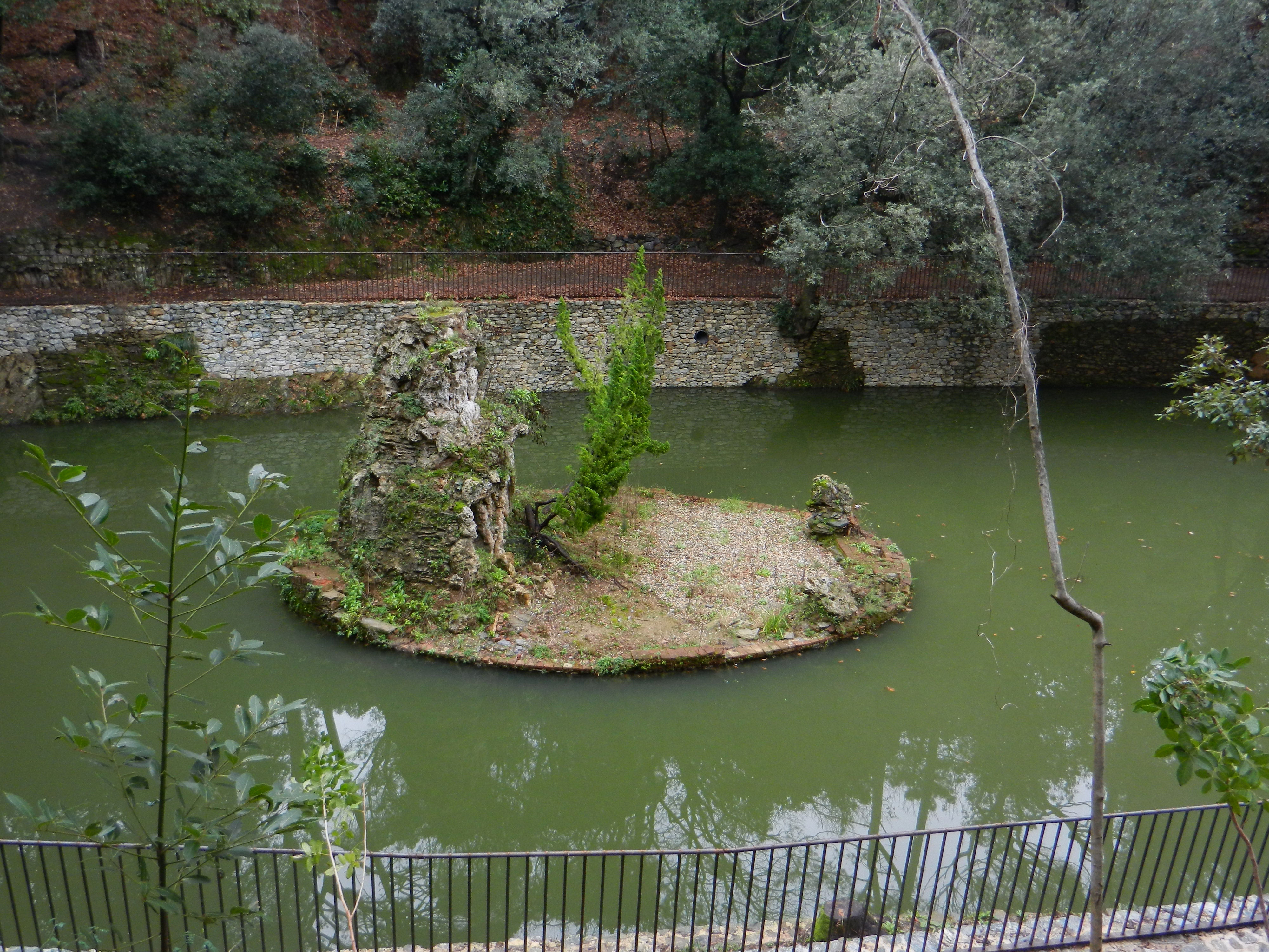 Genova Pegli, il laghetto di villa Doria Centurione con l'isolotto creato da Galeazzo Alessi